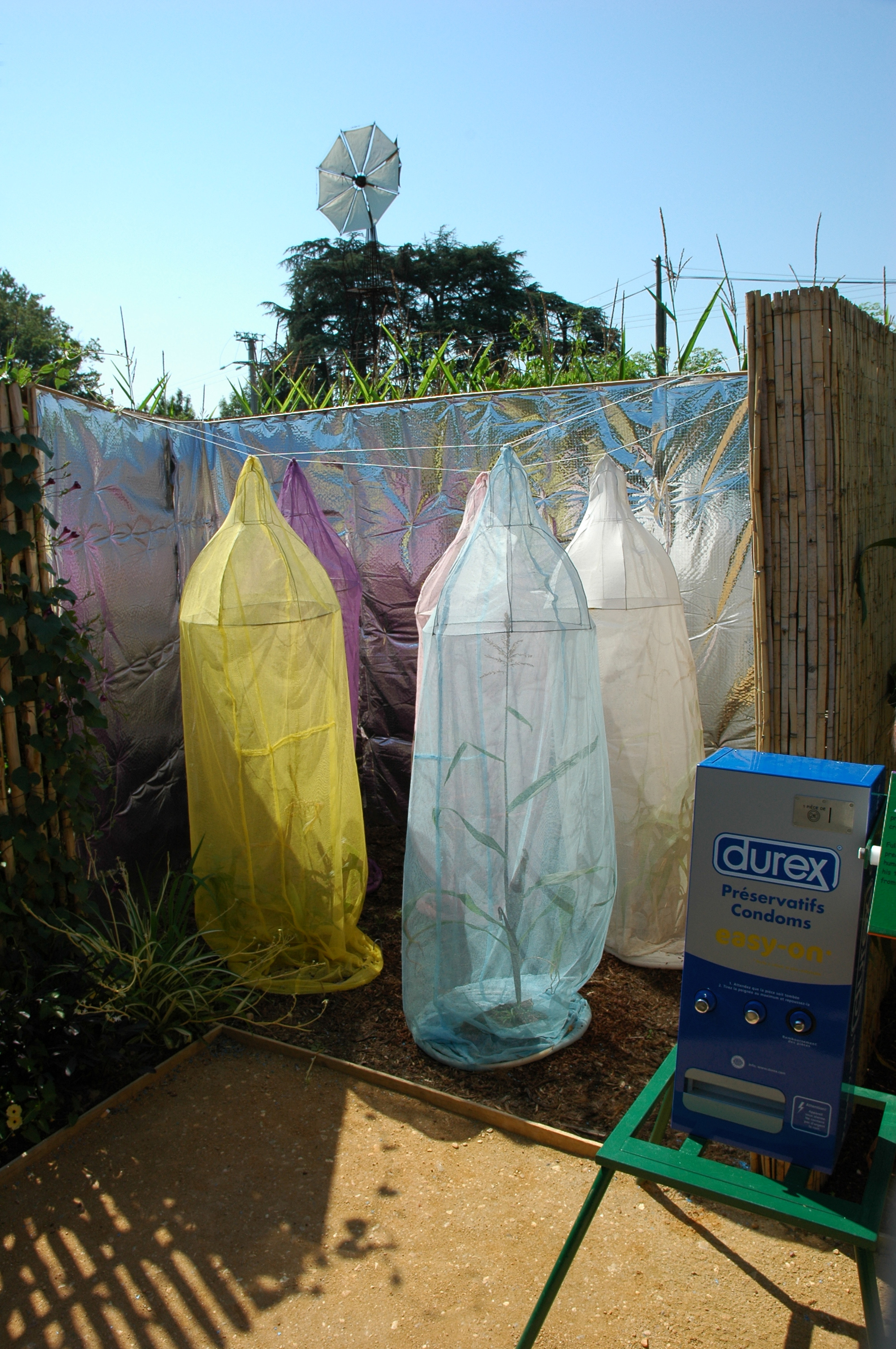 France Loir-et-Cher Festival jardins Chaumont-sur-Loire 2006 Oh j'aime OGM pas Photographie prise par GIRAUD Patrick